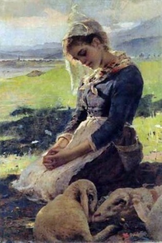 Poesia della montagna, olio su tela, 117,5 x 80,3 cm, Rovereto, Mart.